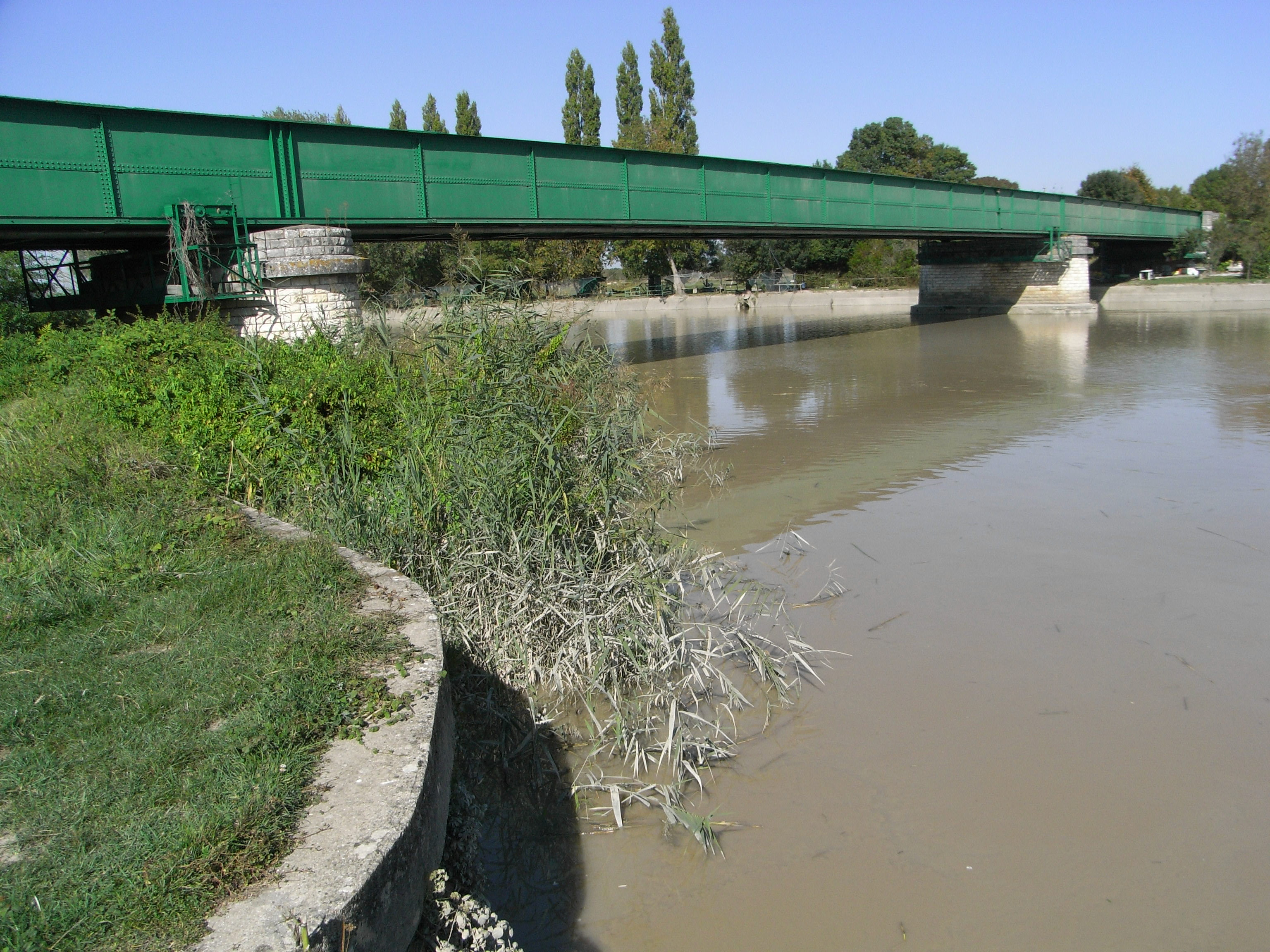 Pont de L'Houmée (D 118) sur la Charente en Charente-Maritime (France).